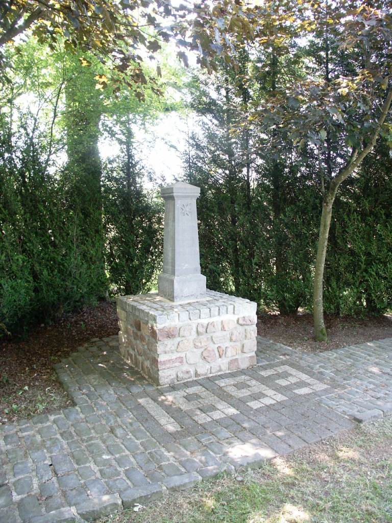 Gedenkstein an die Schlacht von Rocroi in der Nähe des Schlachtfeldes